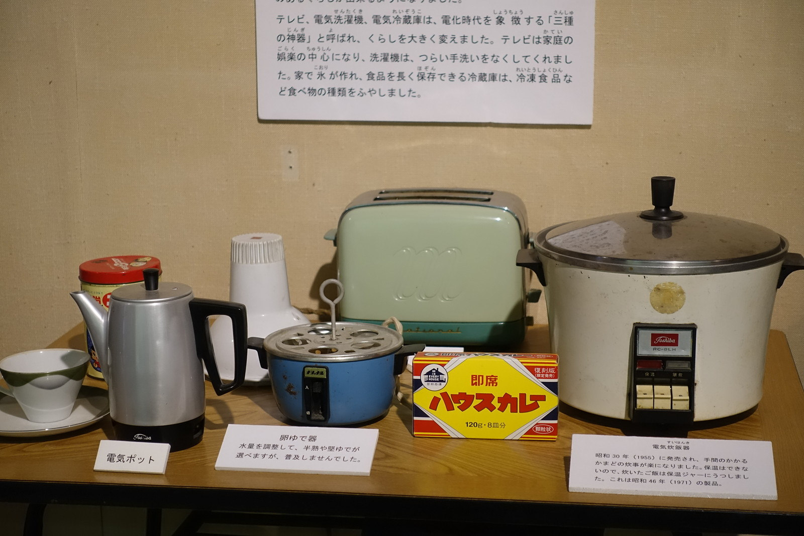 龍ヶ崎歴史民俗資料館 昭和の電化製品